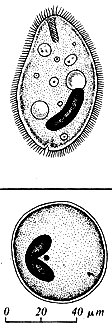 Balantidium coli - trofozoite and cyst